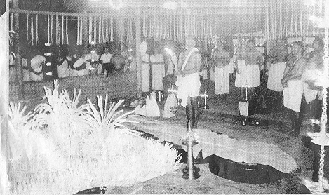 കണ്ണമ്പുഴ അമ്പലത്തിലെ ഗുരുതി പൂജ